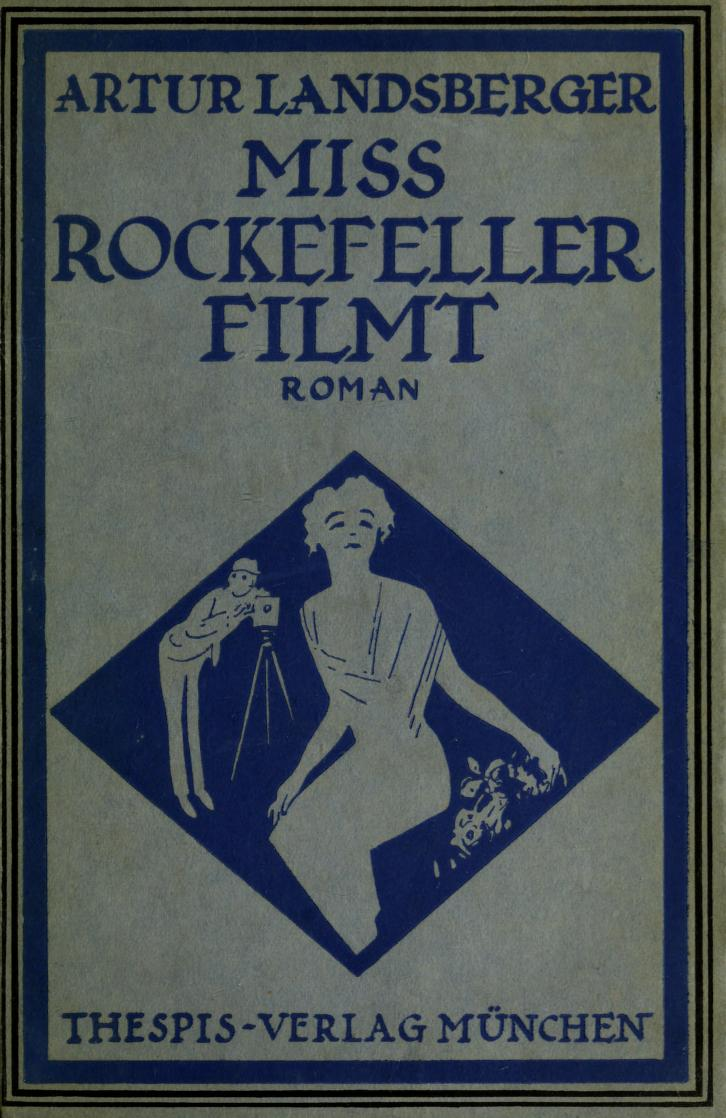 Artur Landsberger - Miss Rockefeller filmt. Ein Filmroman. Thespis-Verlag, München 1920